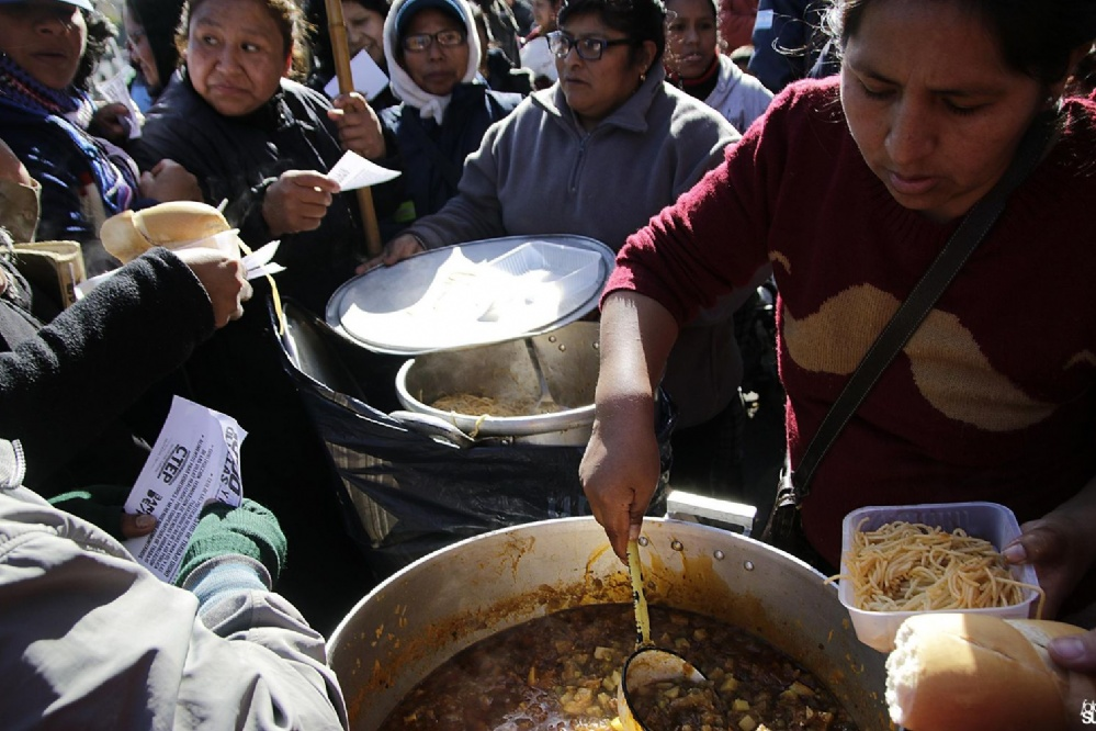 Mujeres piqueteras organizadas, asistiendo y participando aunque sean invisibilizadas